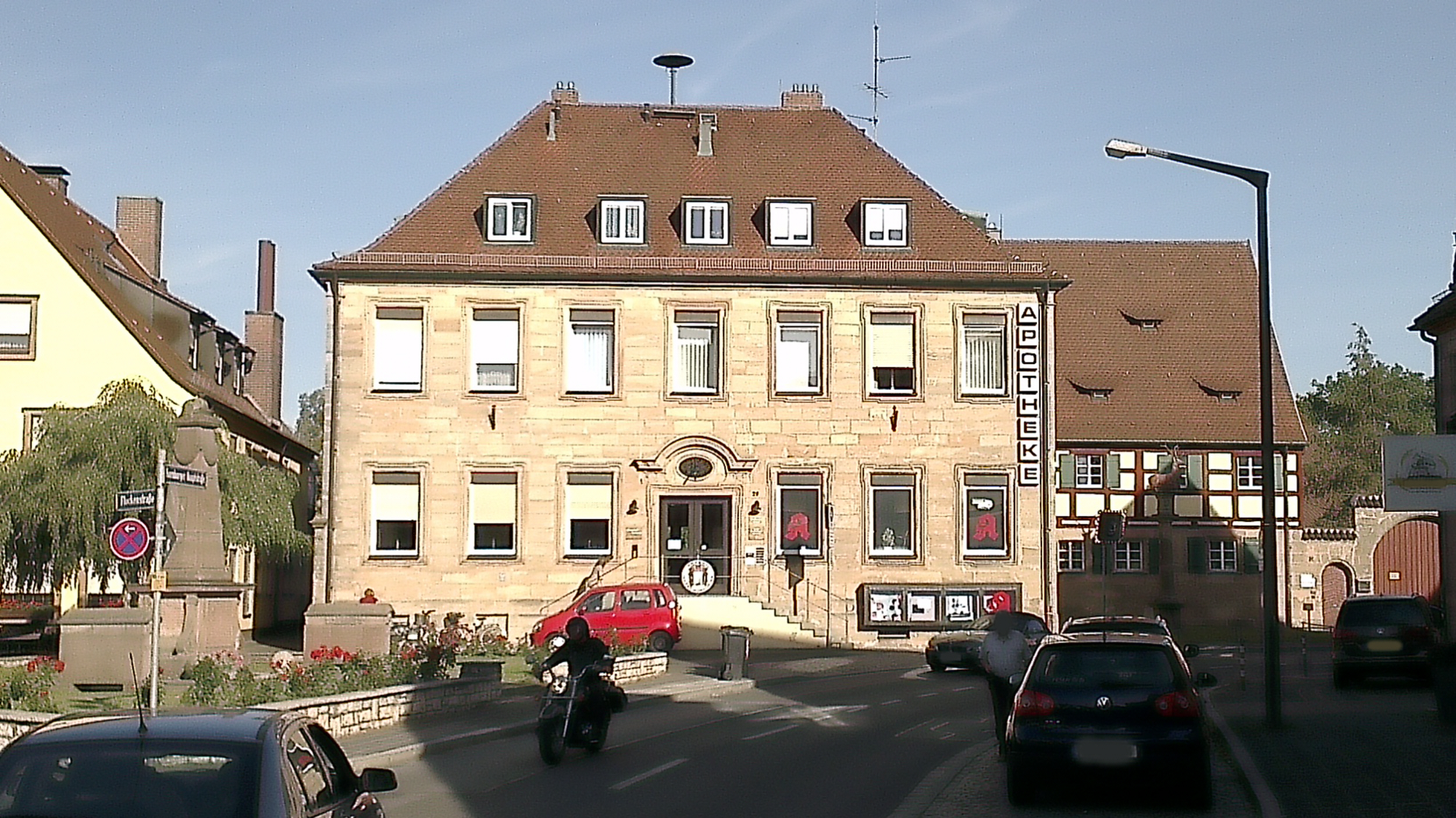 Müller_Vargethsches_Freihaus in Nürnberg Kornburg – Ansicht von West